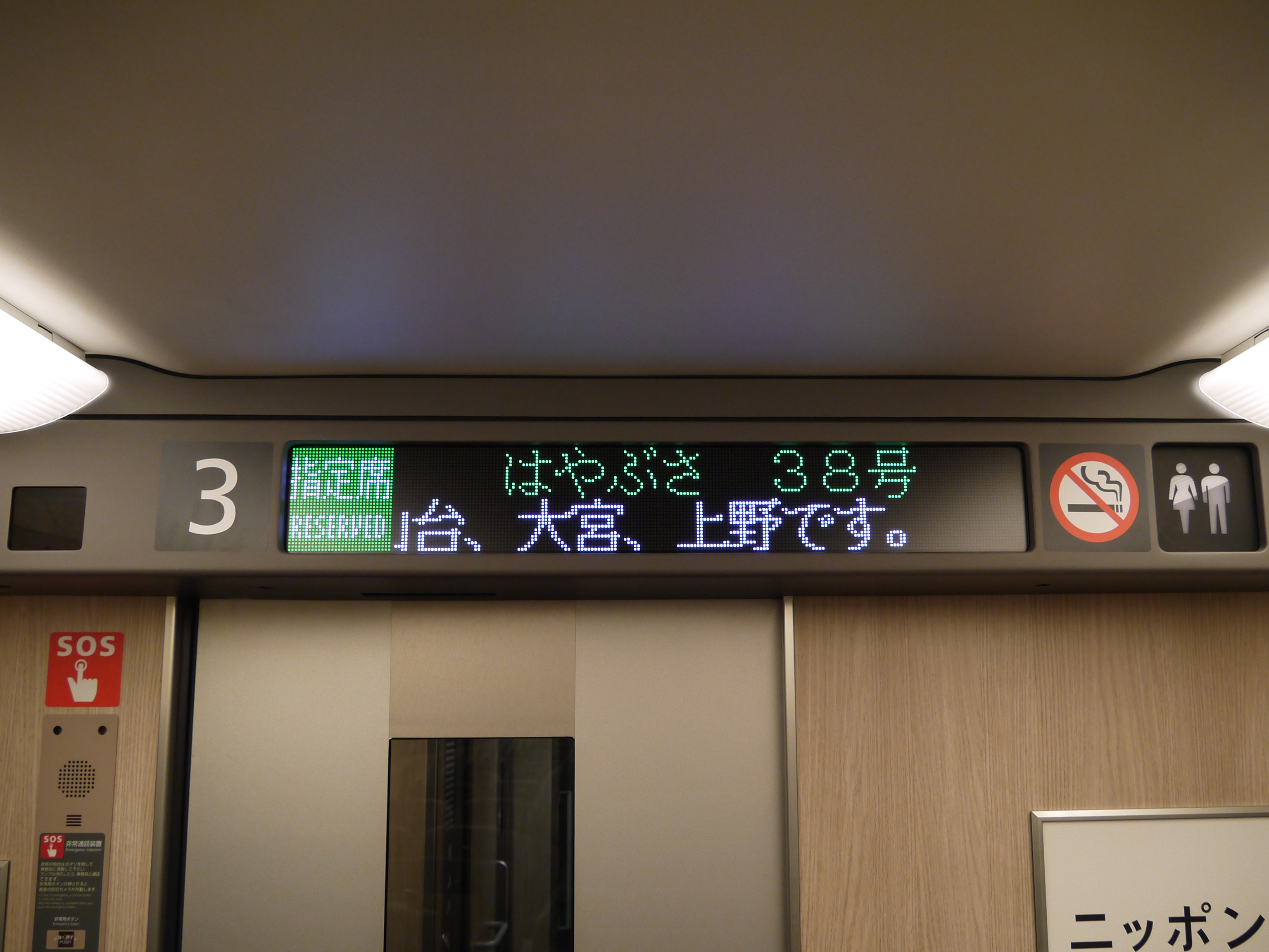 JR東日本 E5系新幹線電車 車内案内表示器